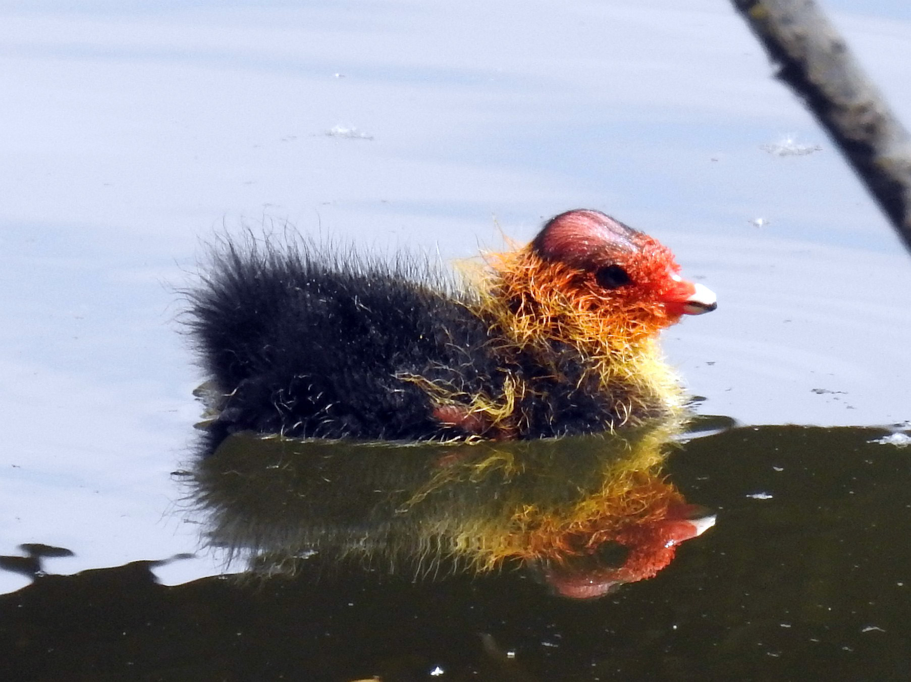 Blesshuhnküken auf den Aradosee in Potsdam